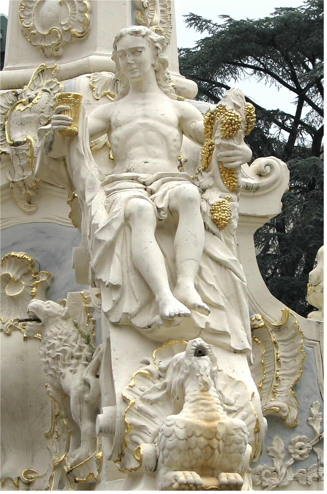 Den Hellege Georg-Pëtz zu Tréier.